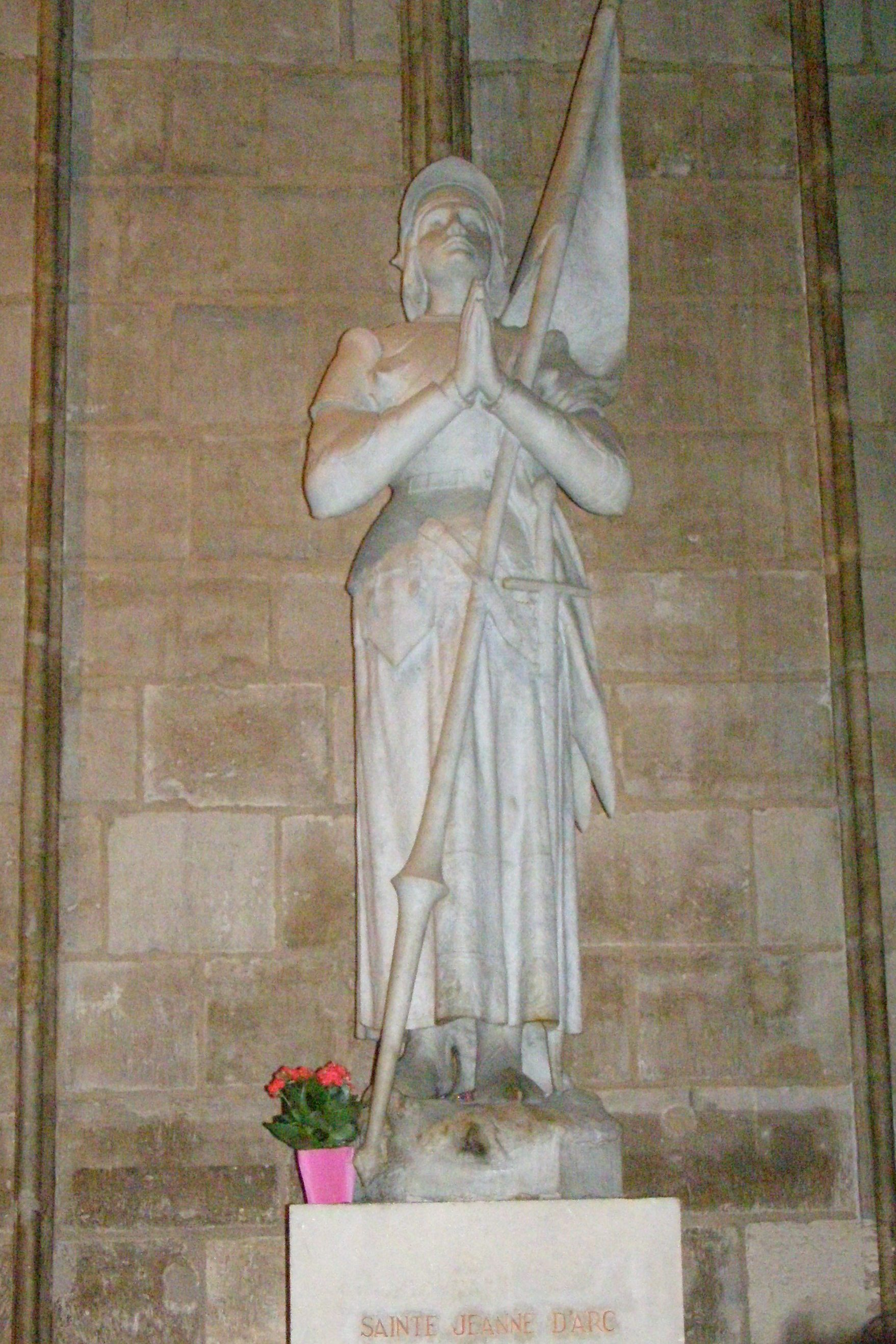 Charles Desvergnes [1]: statue en pied de sainte Jeanne d'Arc priant (env. 1900/1920), Paris, Cathédrale Notre-Dame